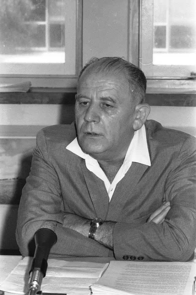 יוסף אלמוגי בעת שכיהן כיו"ר חברת החשמל 1963 - 1966